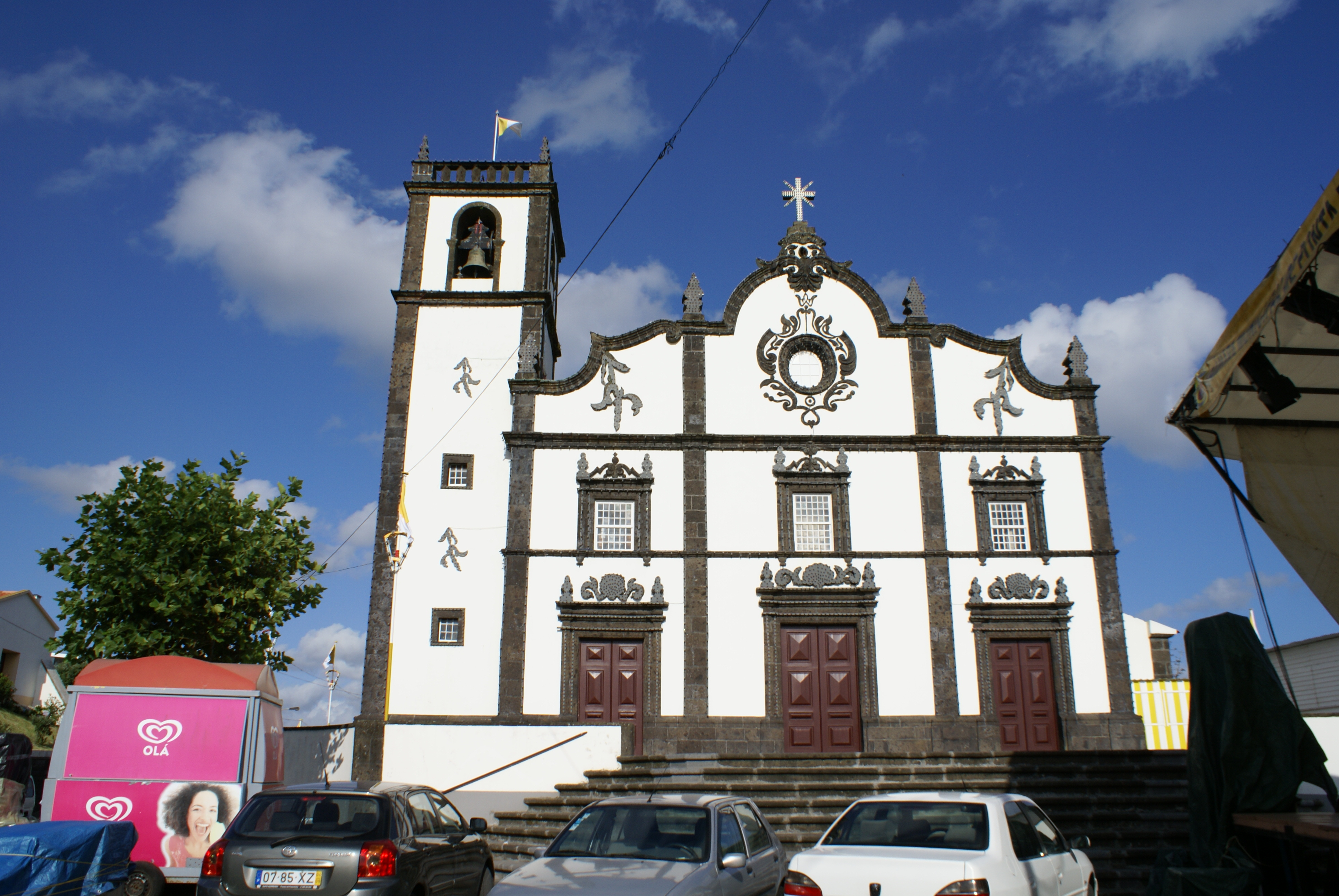 Igreja de São Roque, São Roque, Ponta Delgada, ilha de São Miguel, Açores